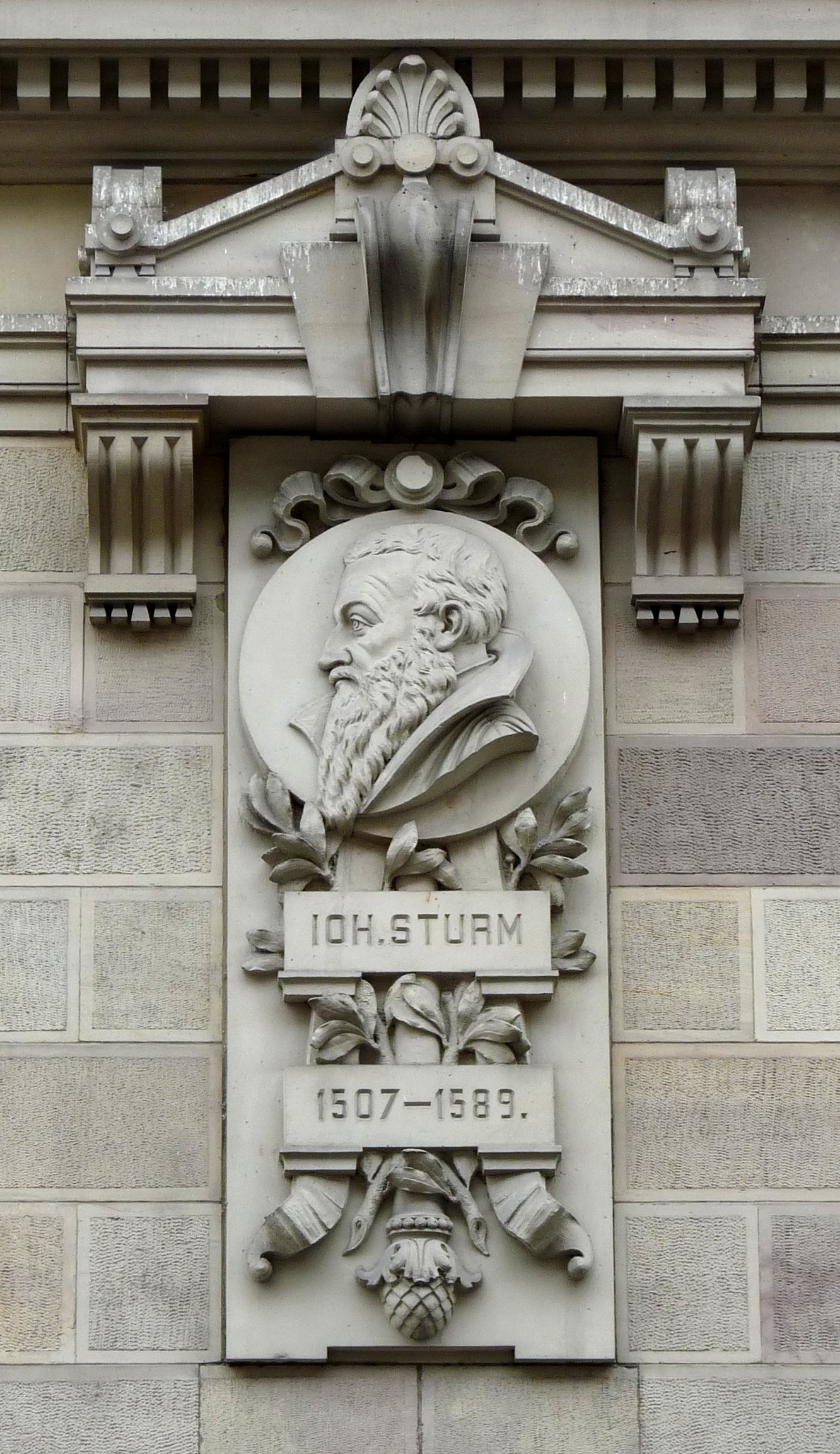 Strasbourg - Théâtre national - Johannes Sturm